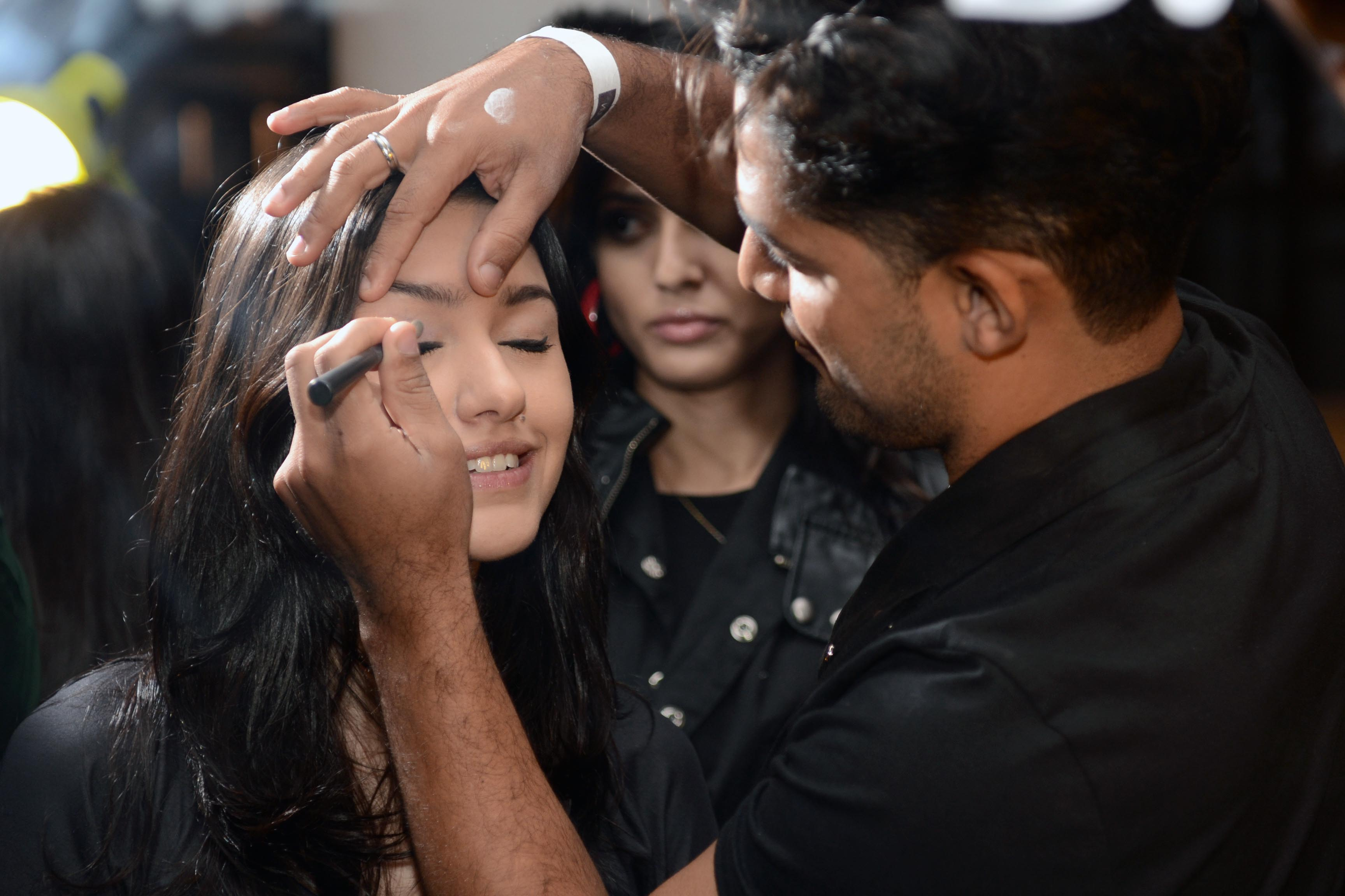 Foto: Marcos Madi